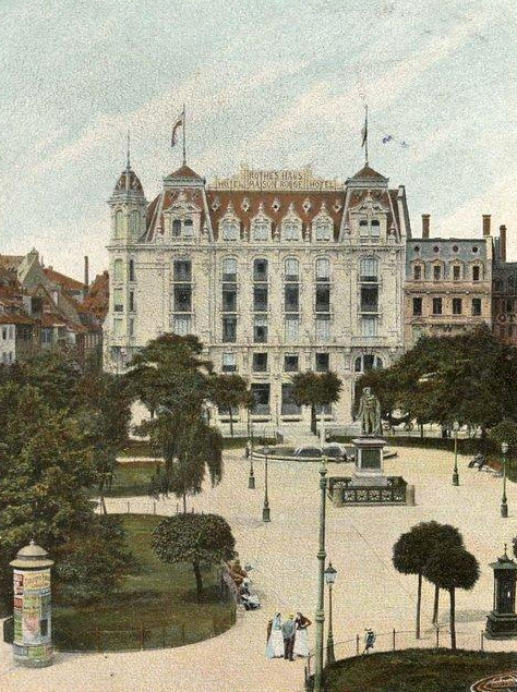 Strassburg i. E. Kleberplatz m. Kleberdenkmal & Hôtel "Rothes Haus". 1918. Bibliothèque nationale et universitaire de Strasbourg